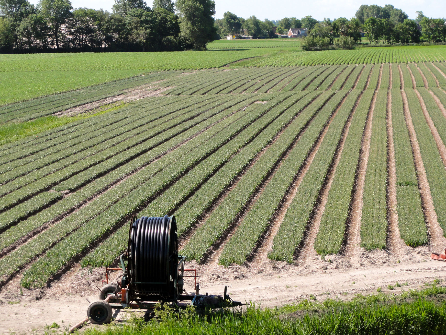 Zicht op Nieuwebildtzijl vanaf de zeedijk